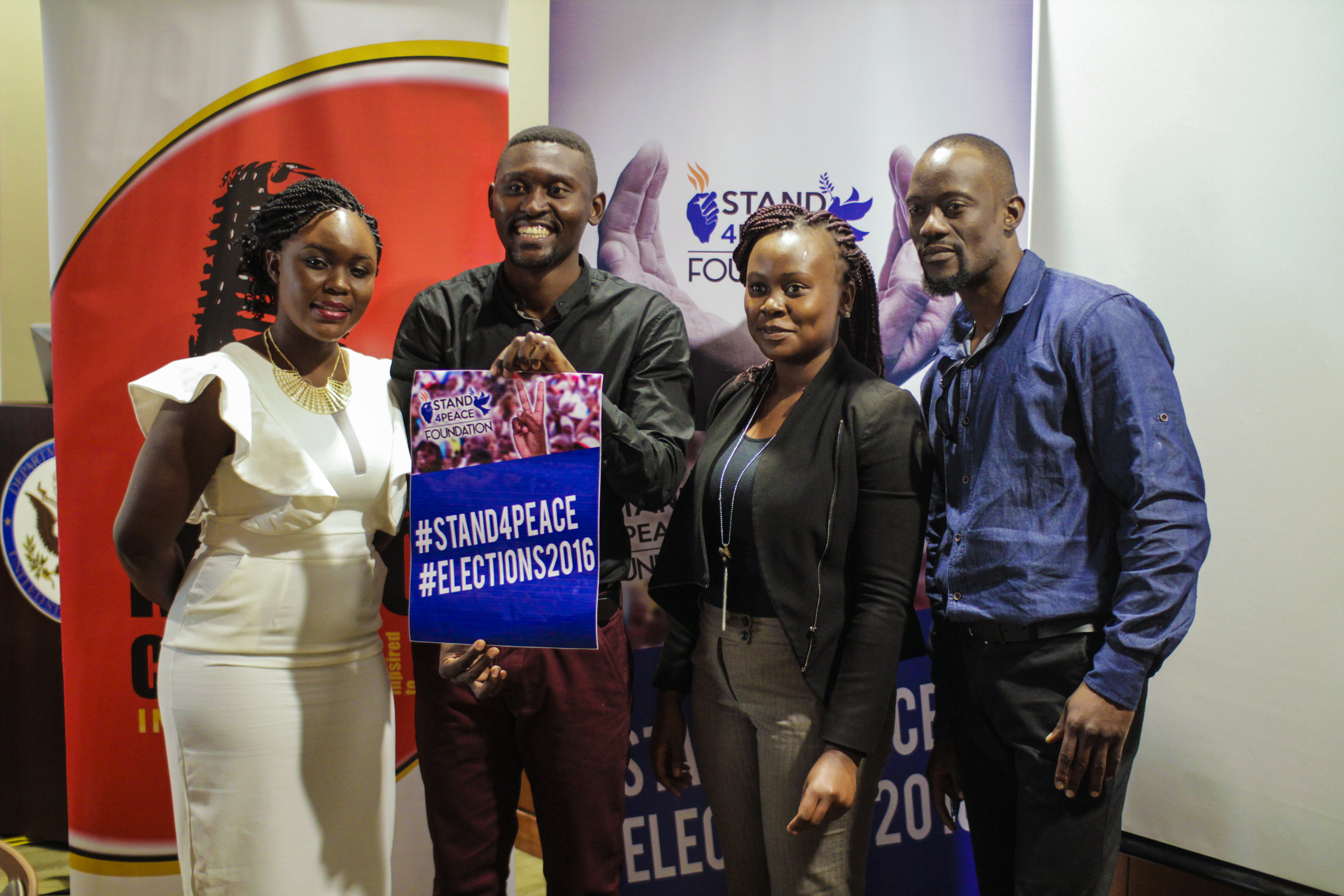 Chi-Chewa: Woimba nyimbo B'Flow pa msonkhano wa Triple V ku ambassade ya US